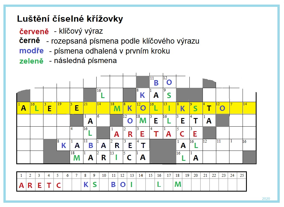 Názorný návod, jak postupovat při luštění číselné křížovky.